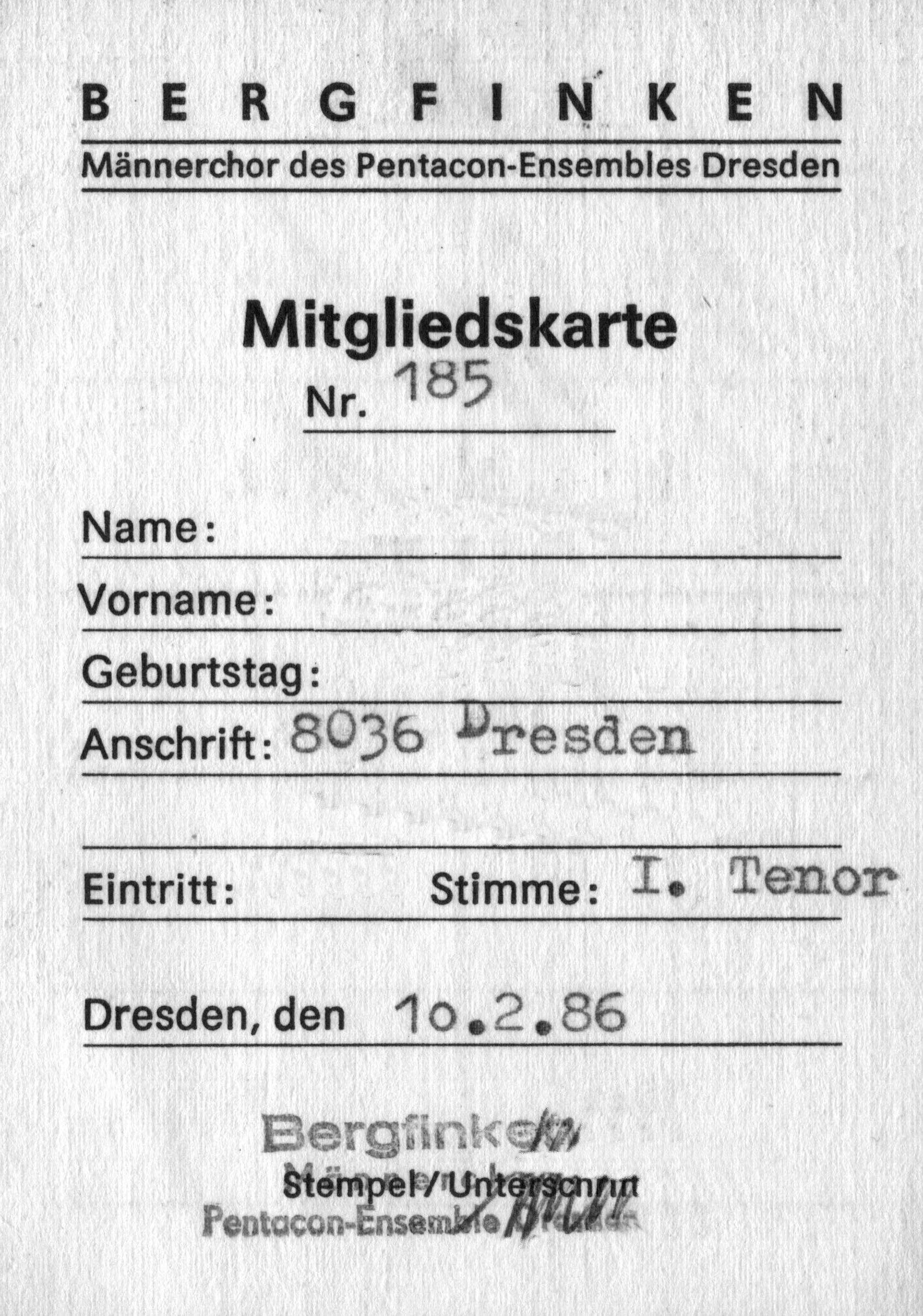 Mitgliedskarte des Männerchor "Bergfinken" unter damaliger Trägerschaft des VEB Pentacon Dresden im Jahr 1986